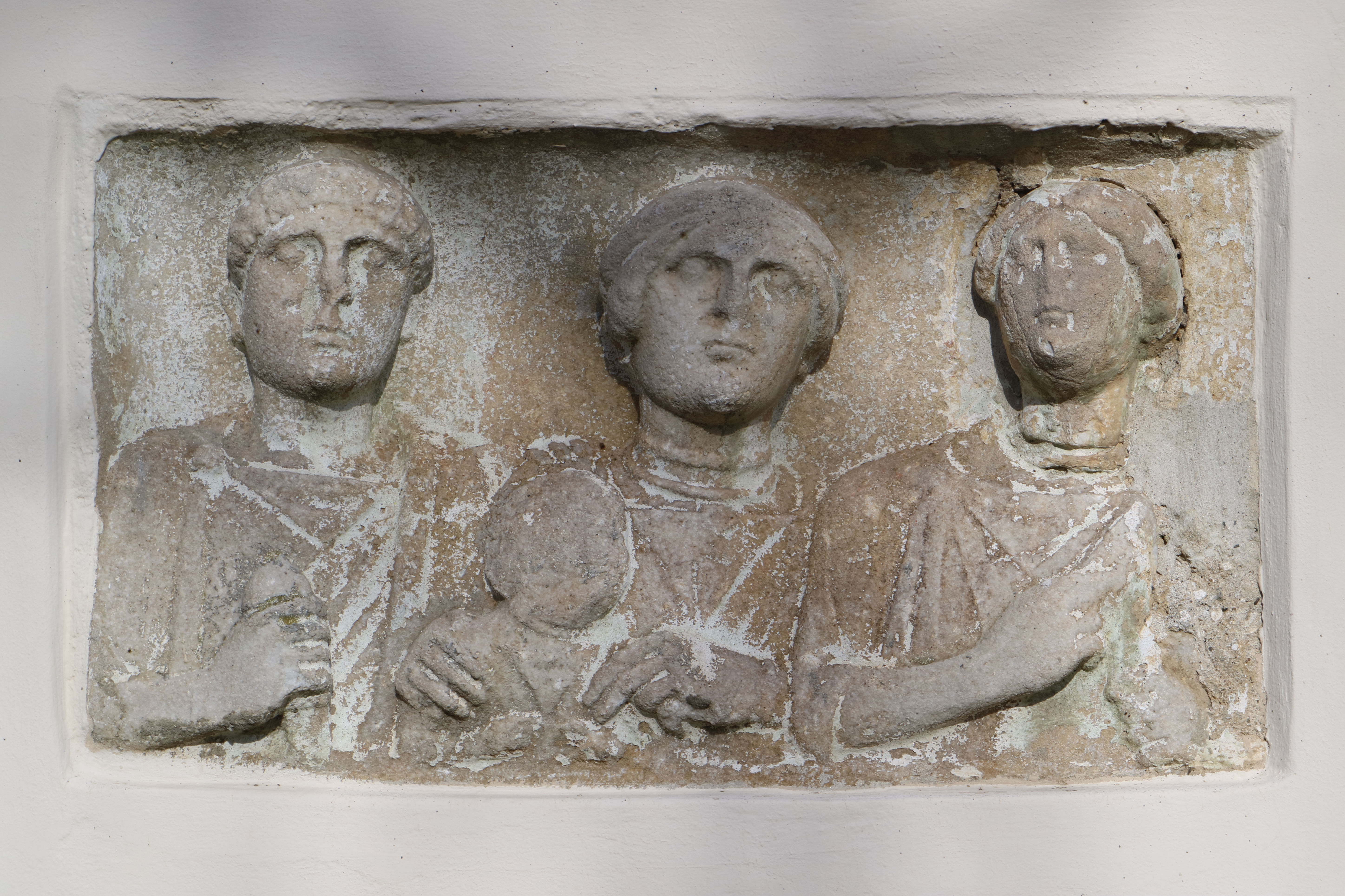 Römisches Wandrelief an der Kirchenmauer von Maria im Dorn (Dobl)